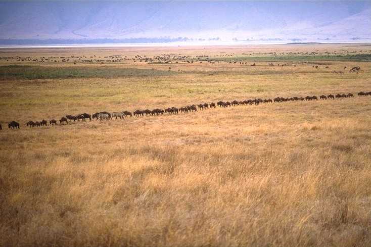 Ngorongoro National Park - Tanzania